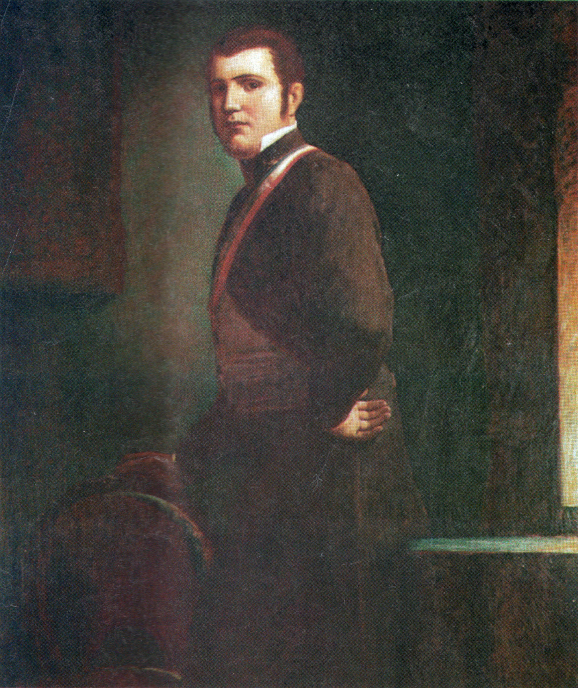 José Tomás Ovalle Bezanilla (Santiago, 21 de diciembre de 17871 - Santiago, 21 de marzo de 1831) fue un abogado, político y Presidente Provisional de Chile que gobernó el país desde 1829 a 1830 y de 1830 a 1831, fue la primera persona en ostentar el título de Presidente de la República en fallecer en el cargo.